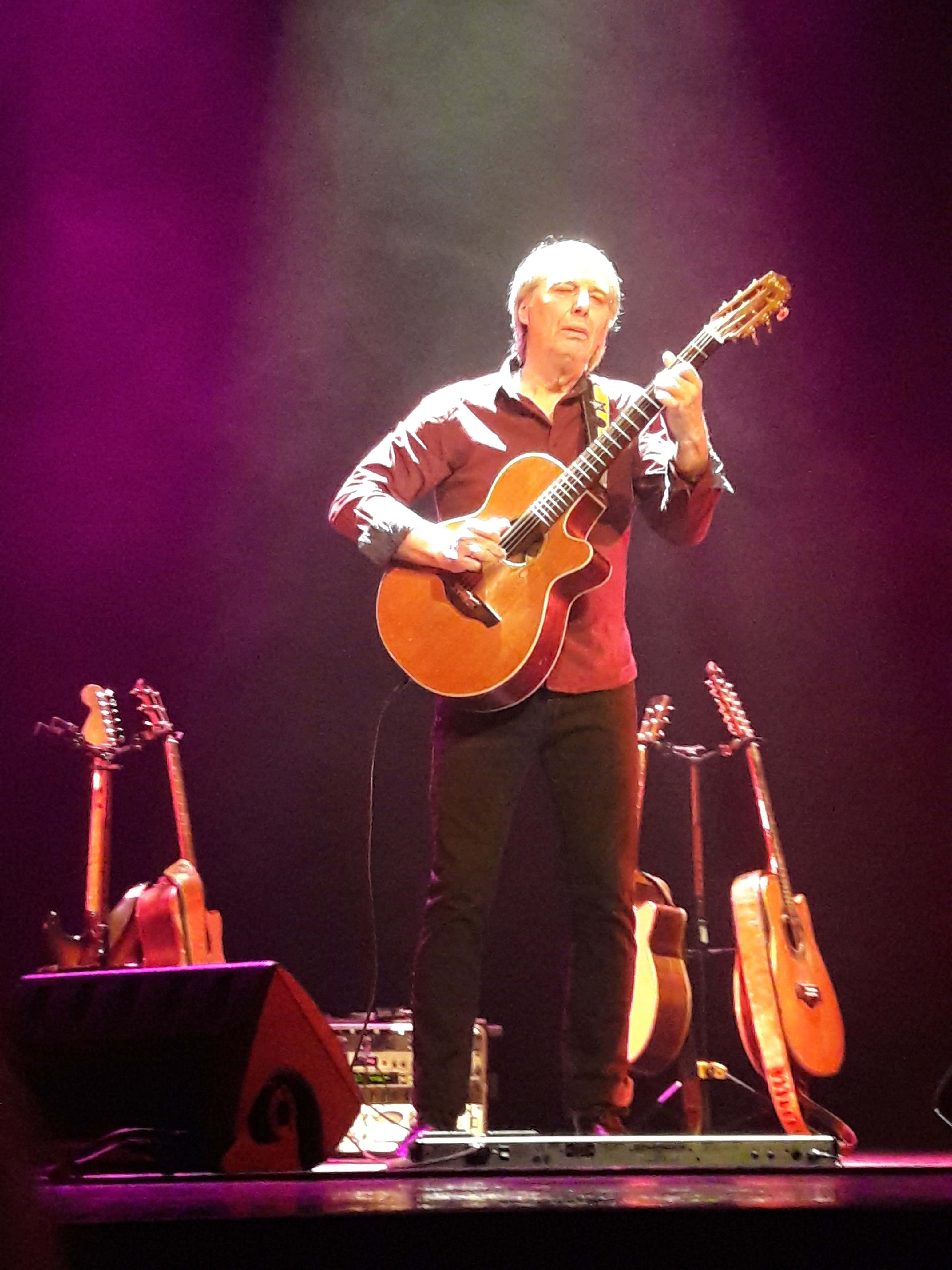 Harry Sacksioni